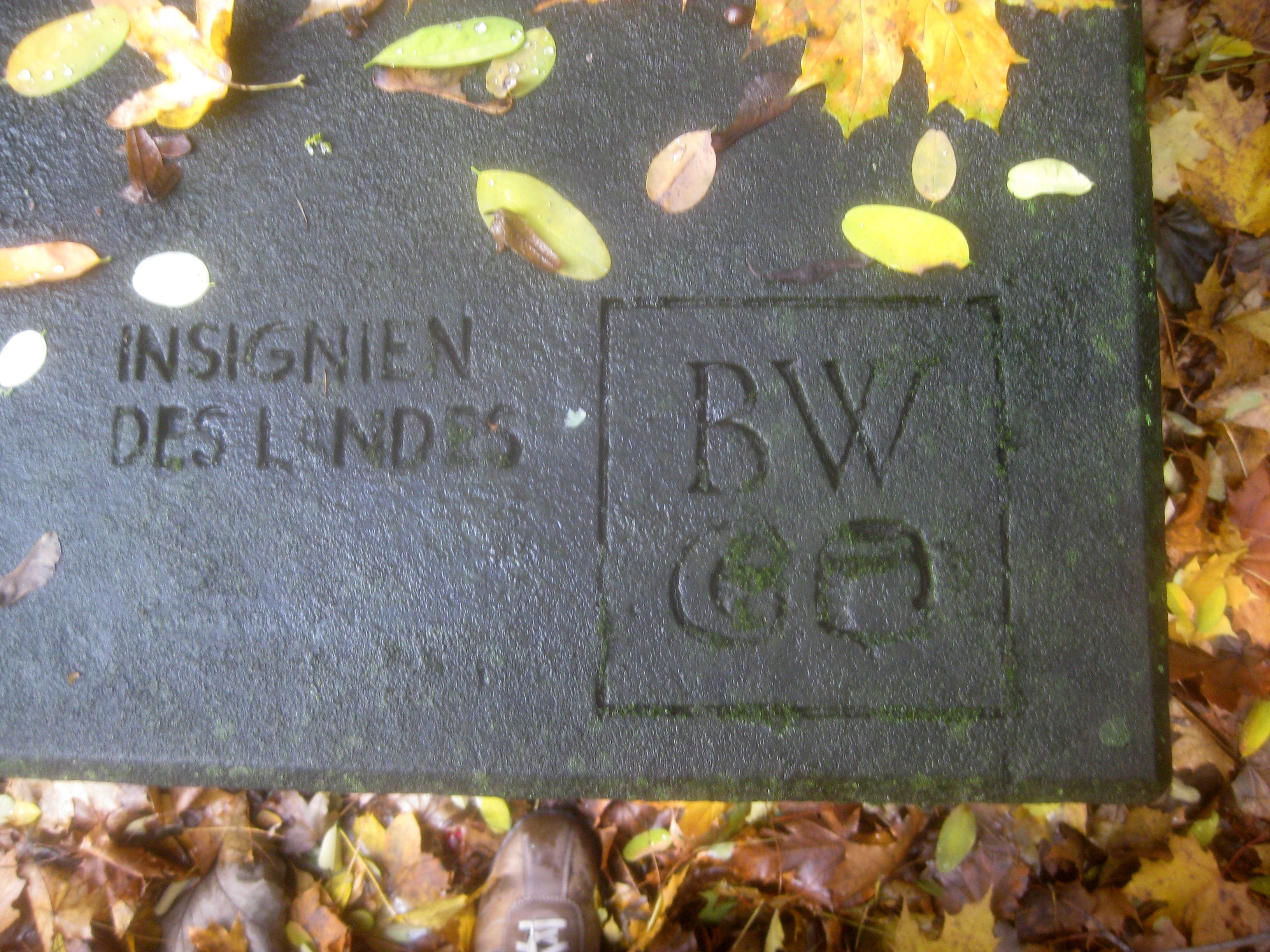 „Insignien des Landes BW“. – Gravur auf dem Tisch einer steinernen Sitzgruppe mit Comic-Gravuren von Hanns und Knut Lohrer, Teil der Kunststation Im Keuper von Hans Dieter Bohnet am St.-Louis-Weg auf dem Wartberg in Stuttgart.